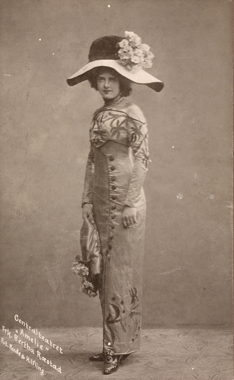 Skuespiller Bertha Ræstad (1887-1959). Rollebilde fra "Amelie" på Centralteatret, Kristiania. This is a retouched picture, which means that it has been digitally altered from its original version. Modifications: Cropped with CropTool. Modifications made by Jeff G..